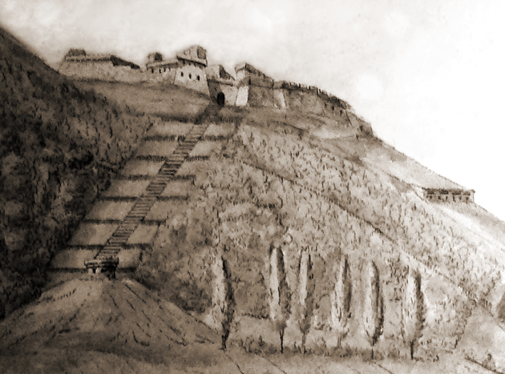 Fort 2 der Befestigungsanlagen auf dem Klüt